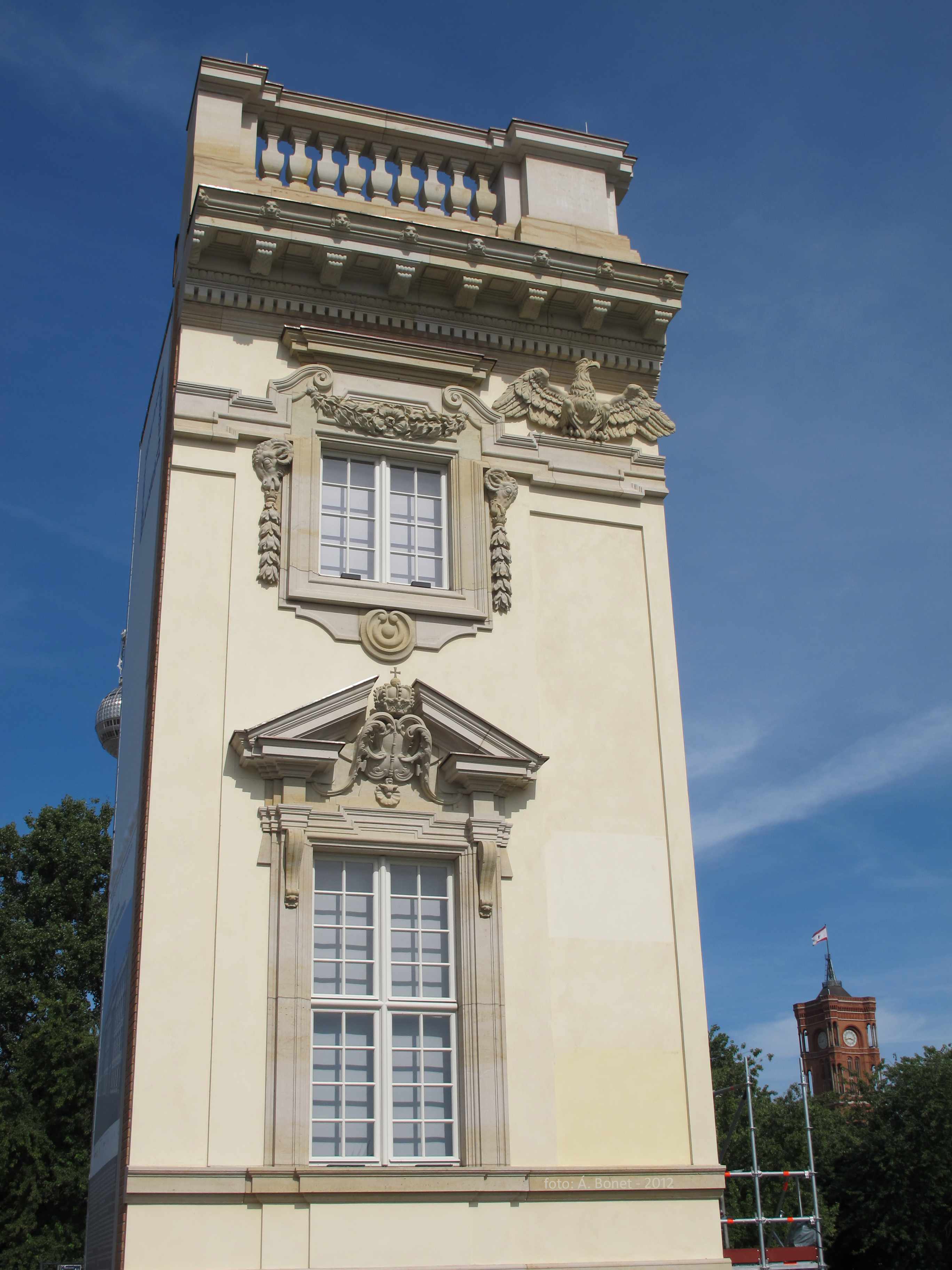 Prueba de fachada para la reconstrucción del Palacio Real de Berlín, realizada en 2012 enfrente de la catedral (Lust Garten)